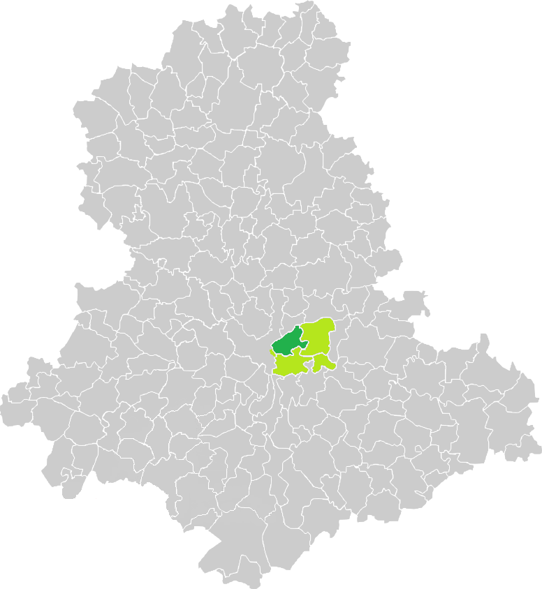 Carte de situation de la commune de Panazol (en vert foncé) dans le votre Canton (en vert clair) sur une carte des communes de la Haute-Vienne